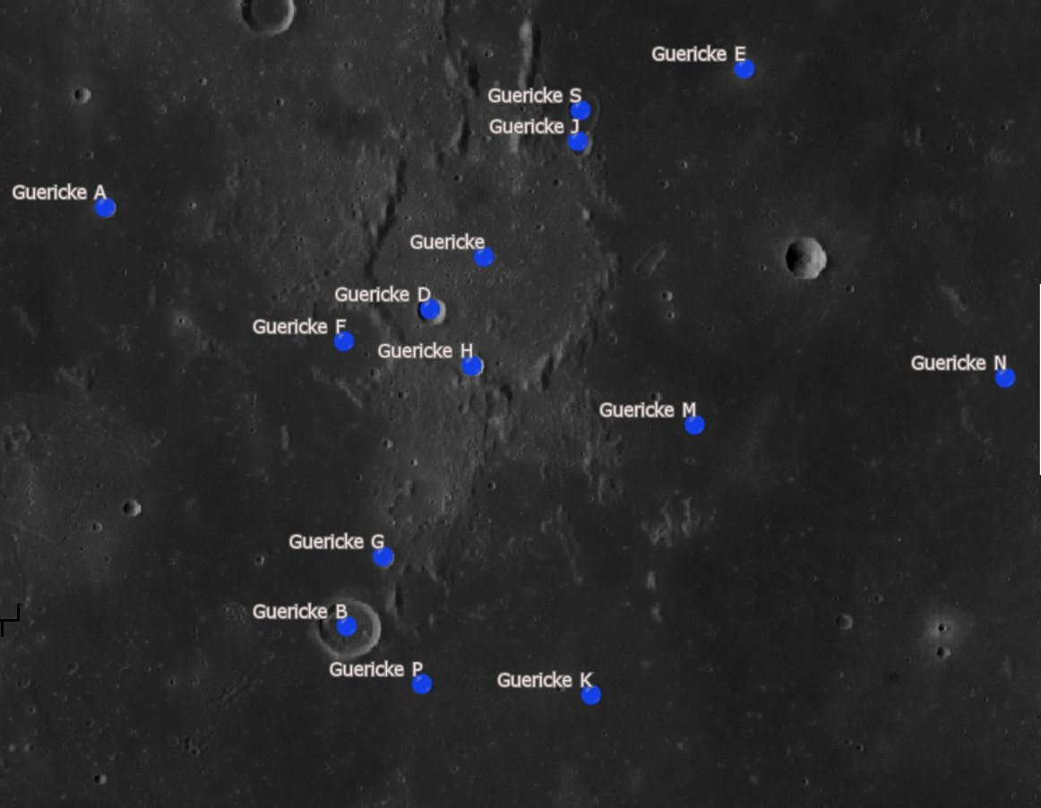 Cráter Guericke. Cráteres satélite. (Imagen LRO)